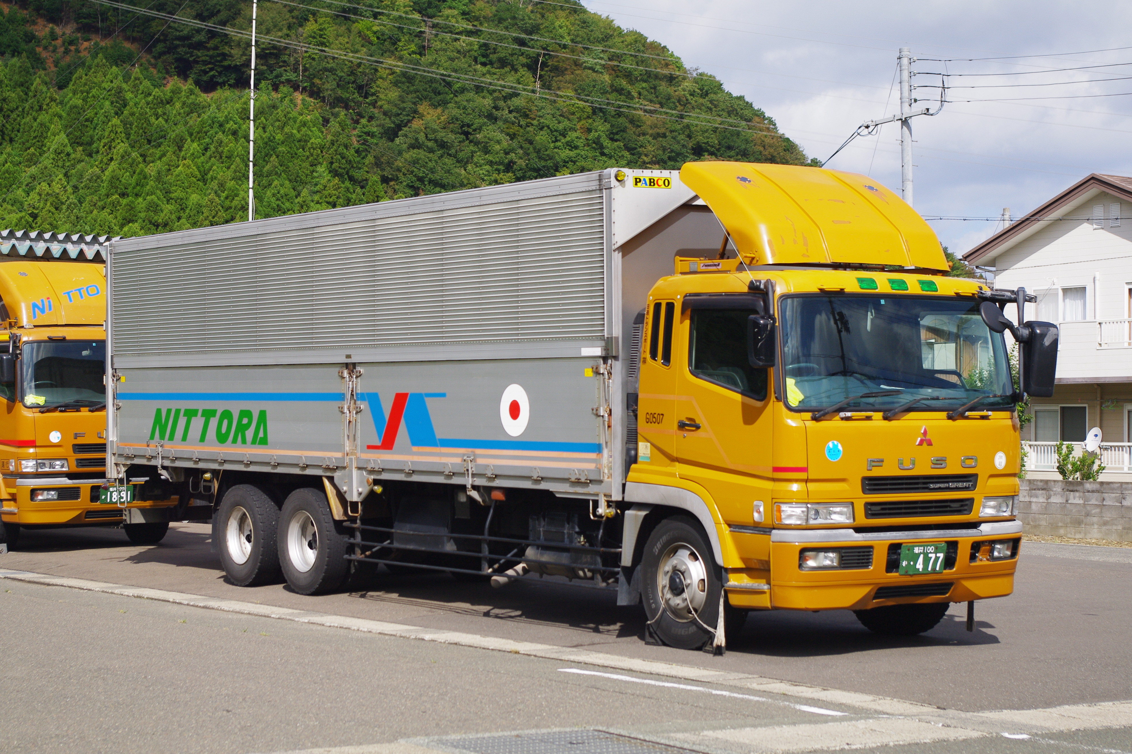 日通トランスポートのスーパーグレート